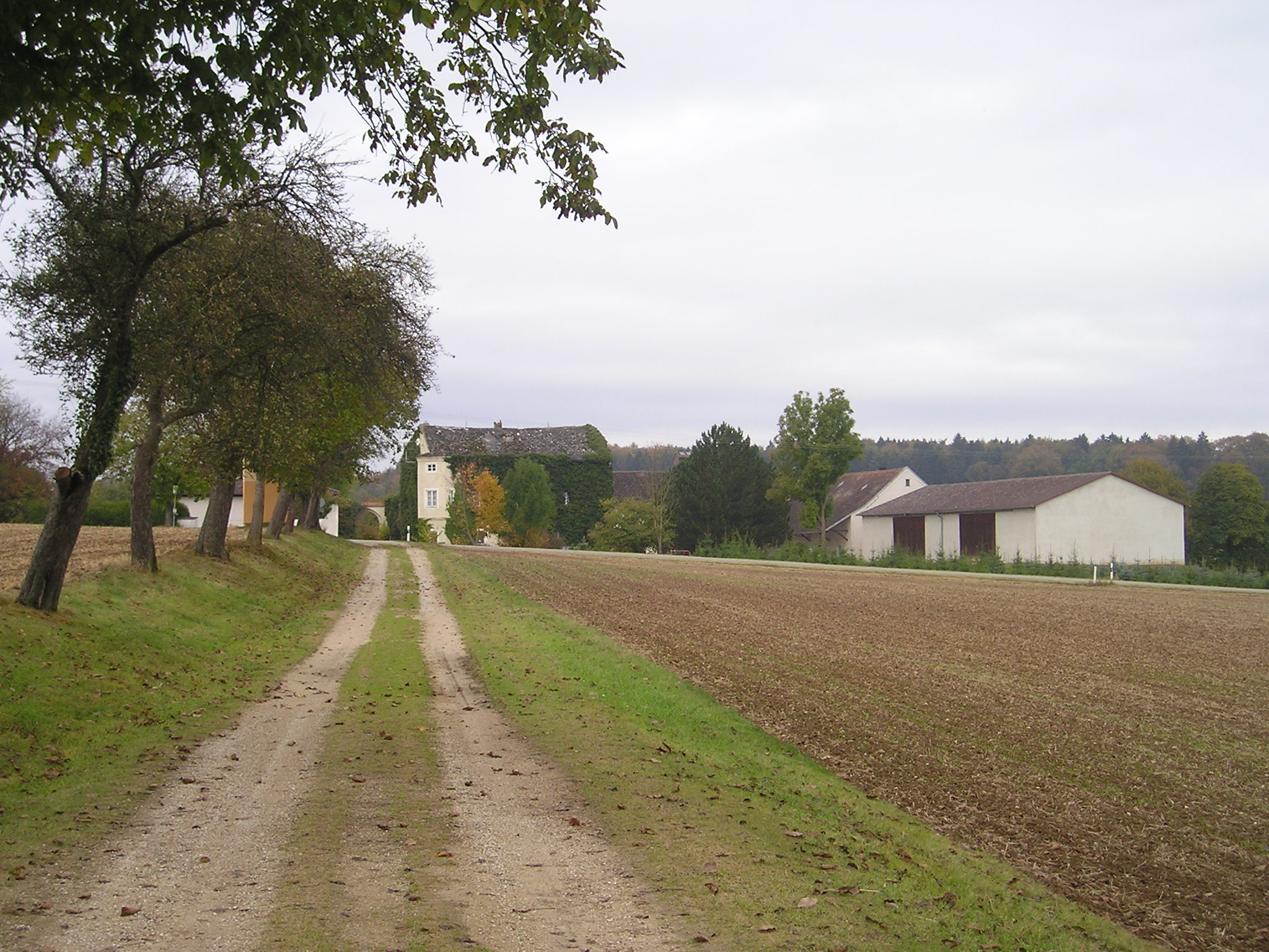 Tempelhof,_Gemeinde_Adelschlag,_Landkreis_Eichstätt,_von_Westen